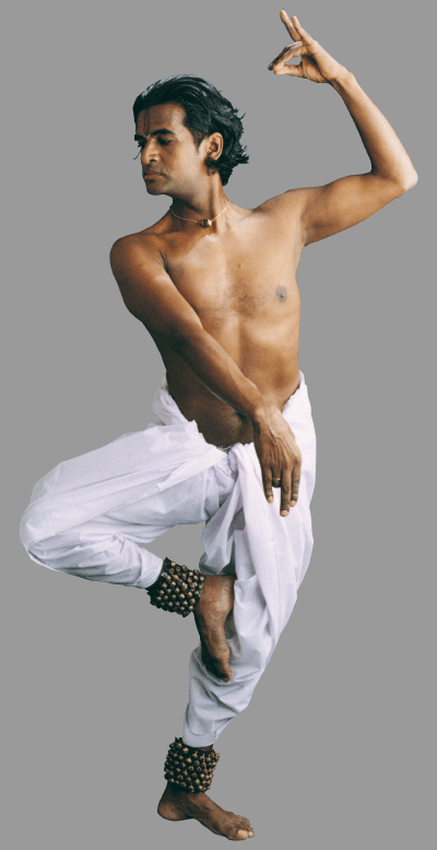 Raghunath Manet Danseur choregraphe de Bharata Natyam joueur de Veena (vina)